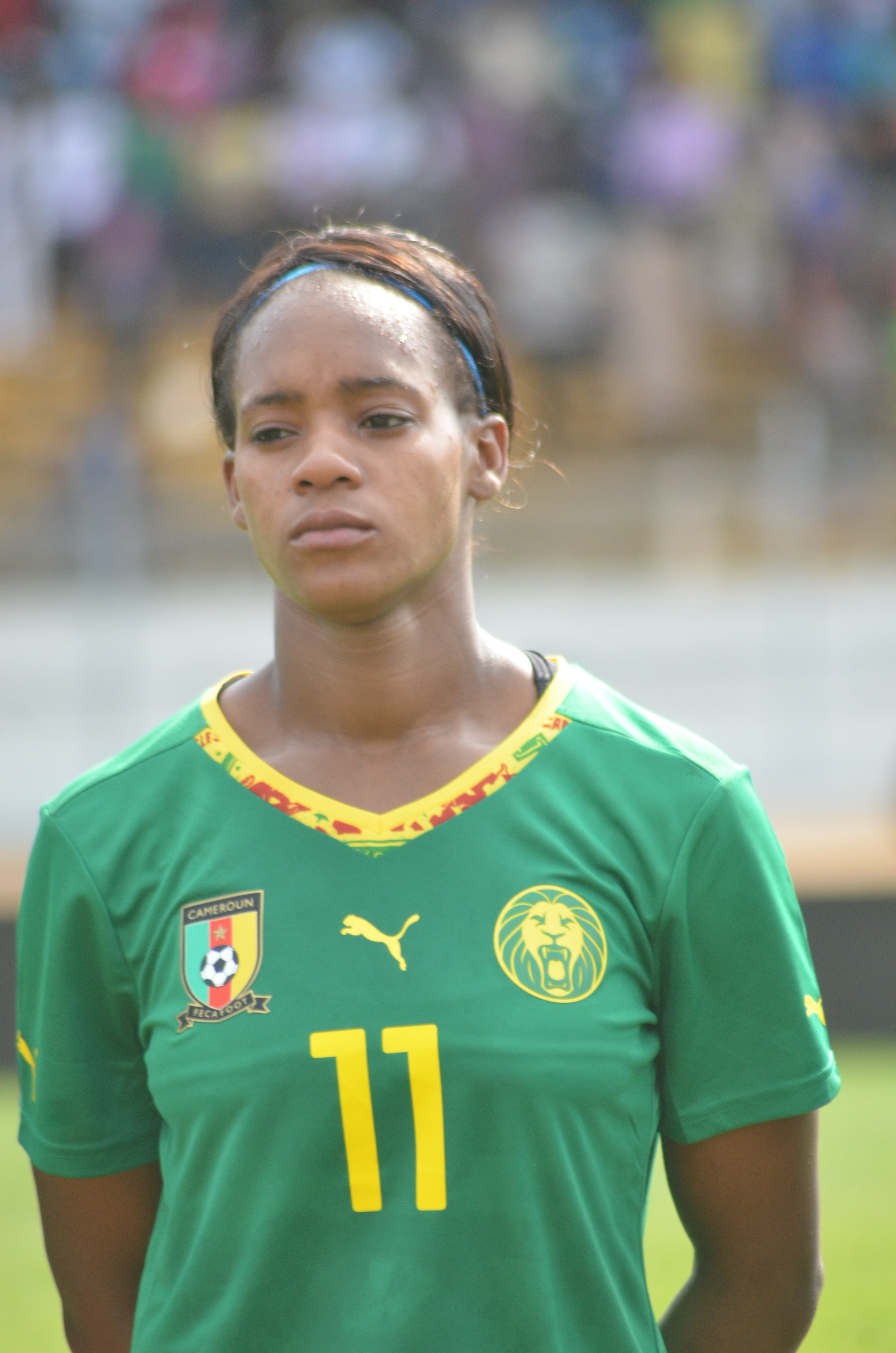 Défenseure de l'équipe nationale du Cameroun